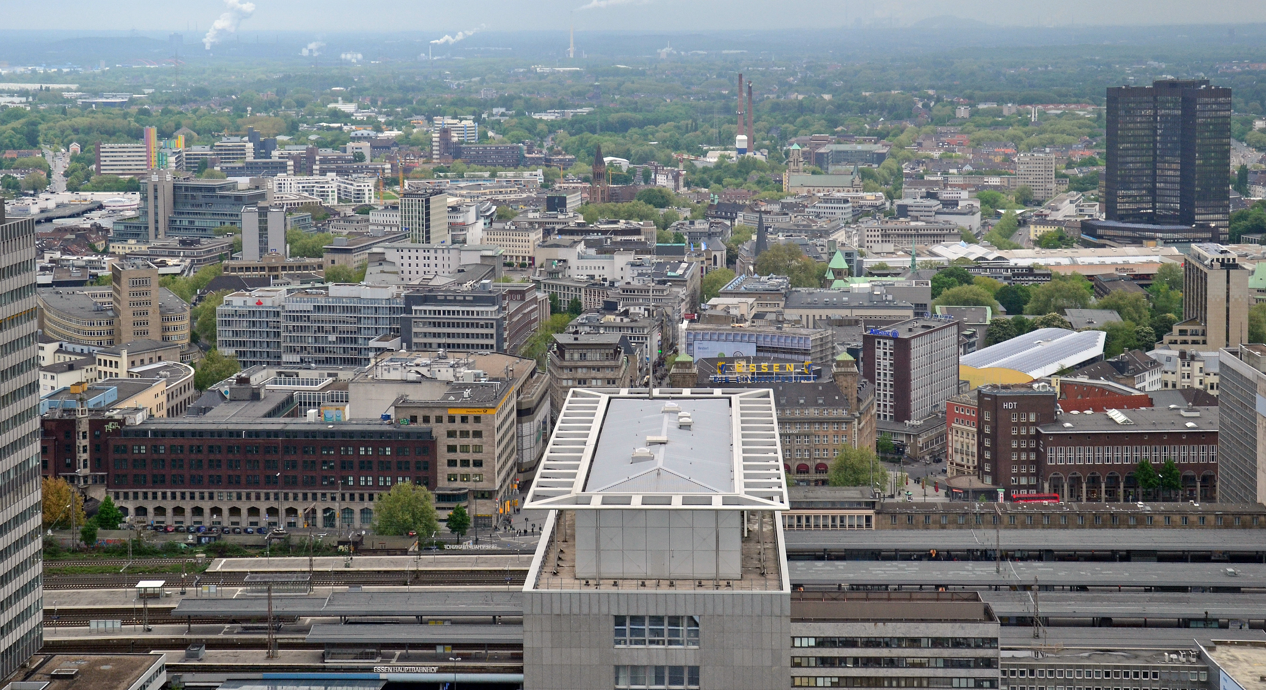 Stadtkern der Stadt Essen, Blick nach Norden